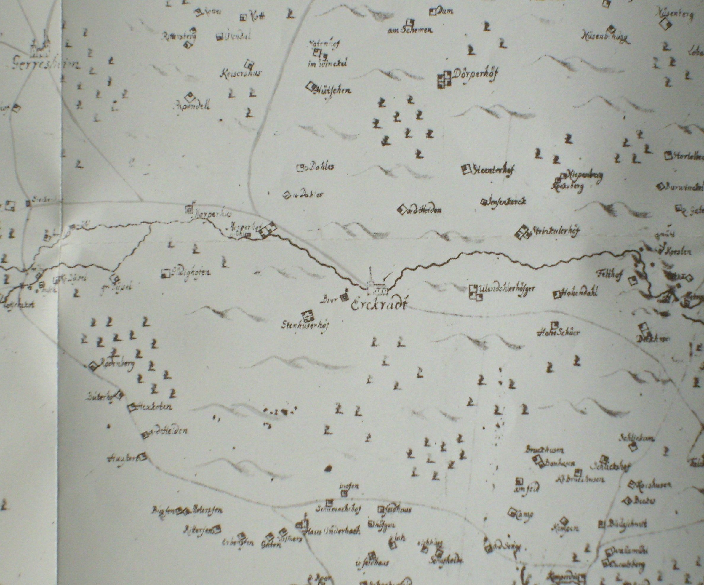 Ausschnitt aus der Karte des „Ambtes Metman“ (der heutige Kreis Mettmann) von 1715. In der Mitte das Kirchdorf Erkrath, links oben zu erkennen die Stadt Gerresheim. Unten am Bildrand das Haus Unterbach und die dortigen Höfe, ganz rechts am Bildrand ist das „Gesteins“, heute als Neandertal bekannt, zu erkennen.